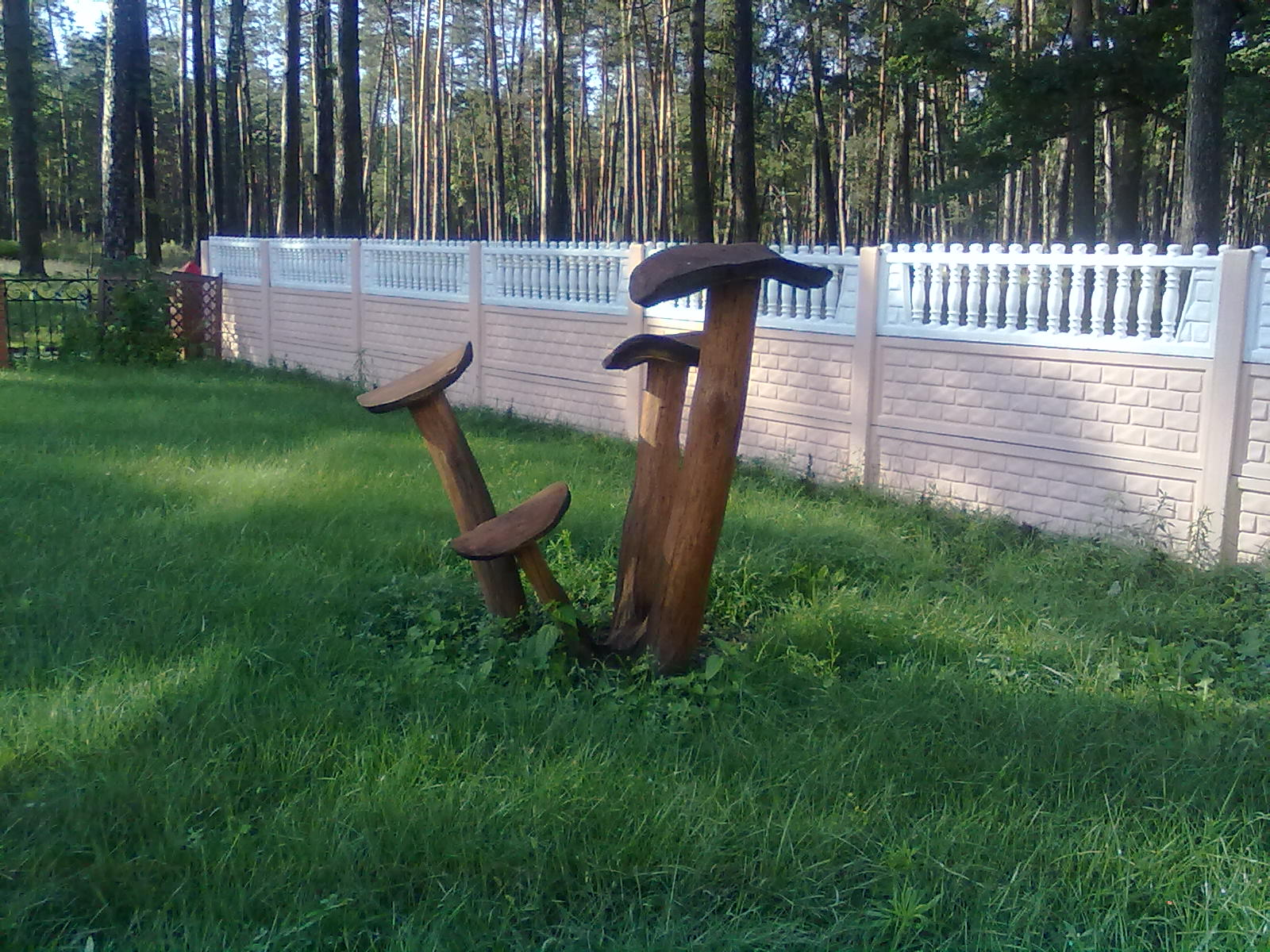 Поделки из дерева